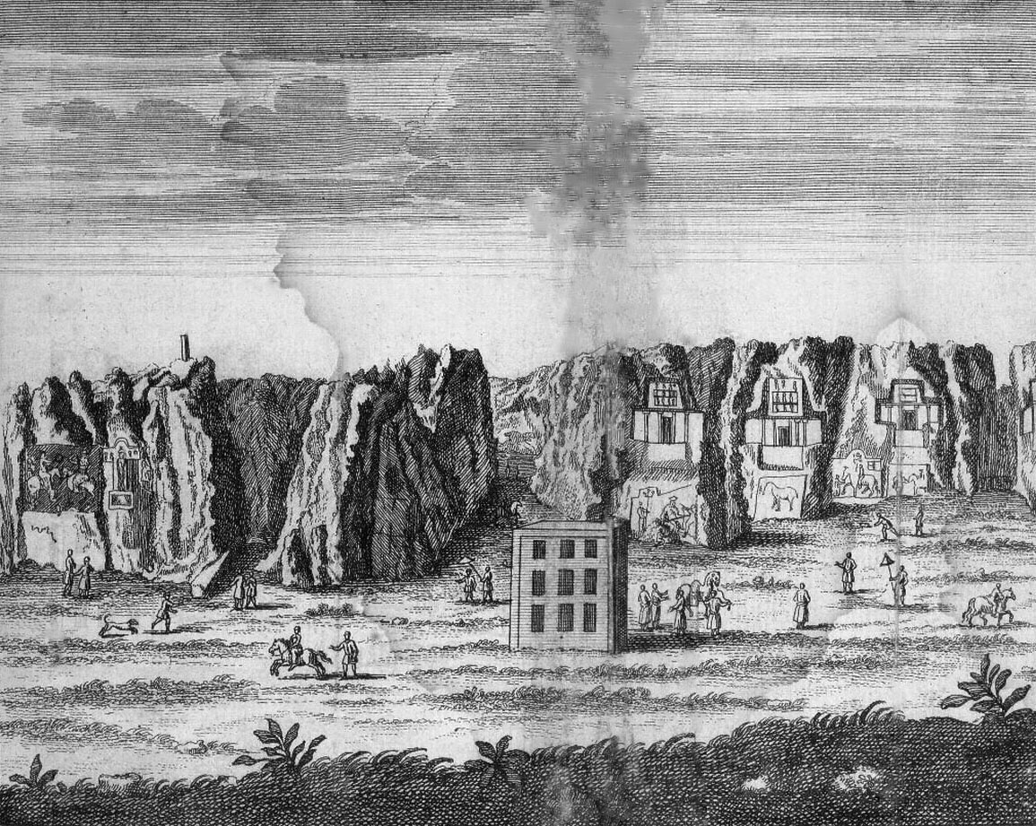 Naqsh-e Rostam seen by Chevalier Chardin. Illustrations de Voyages de Mr. Le Chevalier Chardin en Perse et autres lieux de l'Orient. Tome 9. Pl. dépl. en reg. p.117Réserve DS 257 C 47 1723 v1 à 10